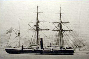 Канонерская лодка «Горностай» — мореходная канонерская лодка Российского императорского флота. Построена на Бьёрнборгской верфи (Финляндия). Наблюдающий — корабельный инженер-капитан Н.И. Базанов, строитель — инженер Л. Кальстрём). Отделочные работы и установка механизмов производились в Кронштадте.